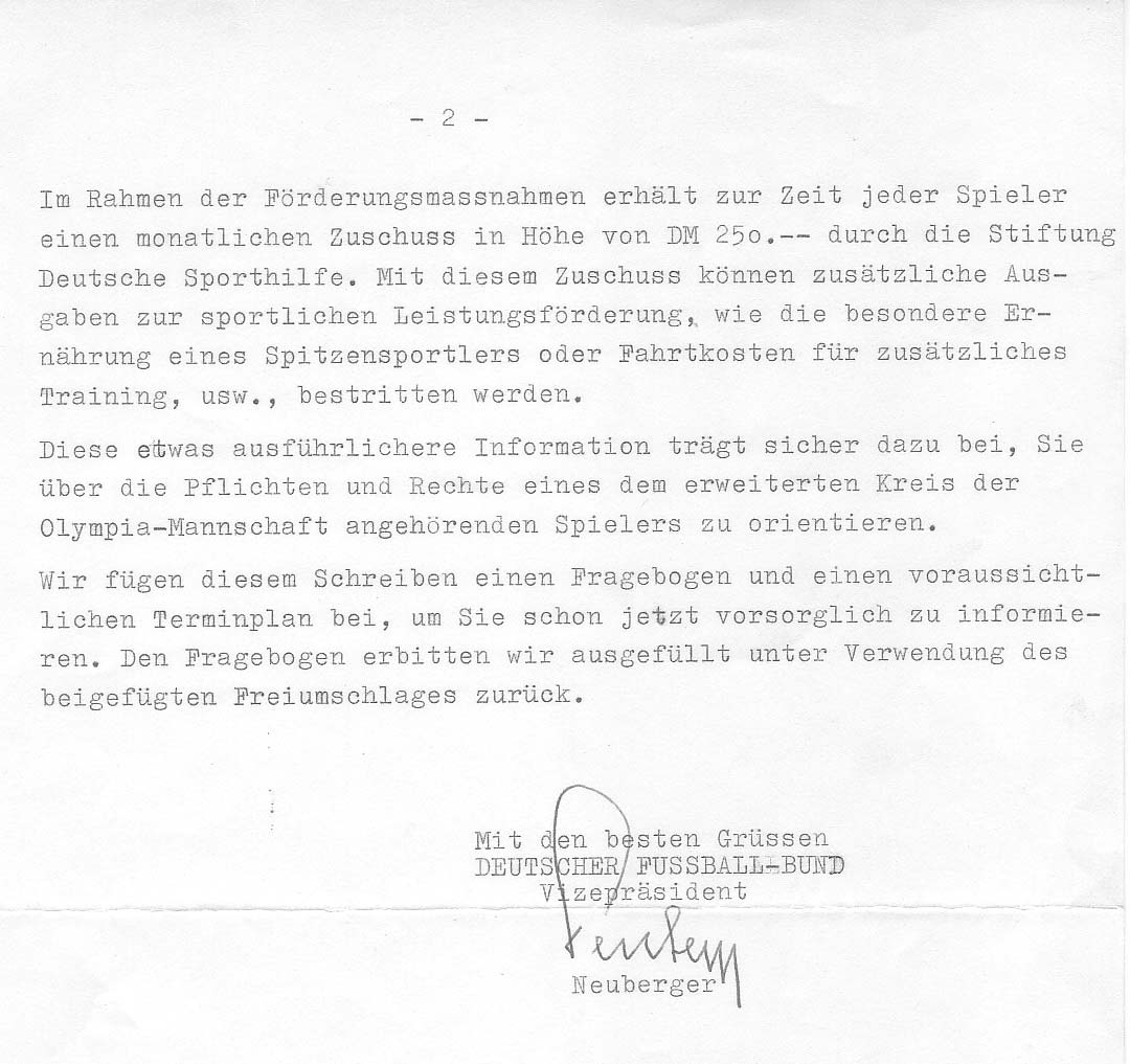 Einberufung in den Kreis der Fußball-Olympiamannschaft des DFBs 1972.